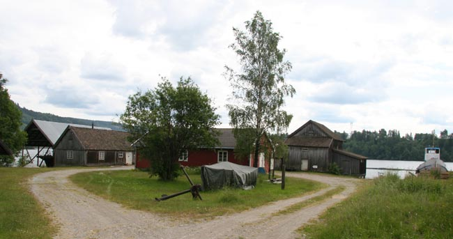 Mjøssamlingene, Eidsvoll